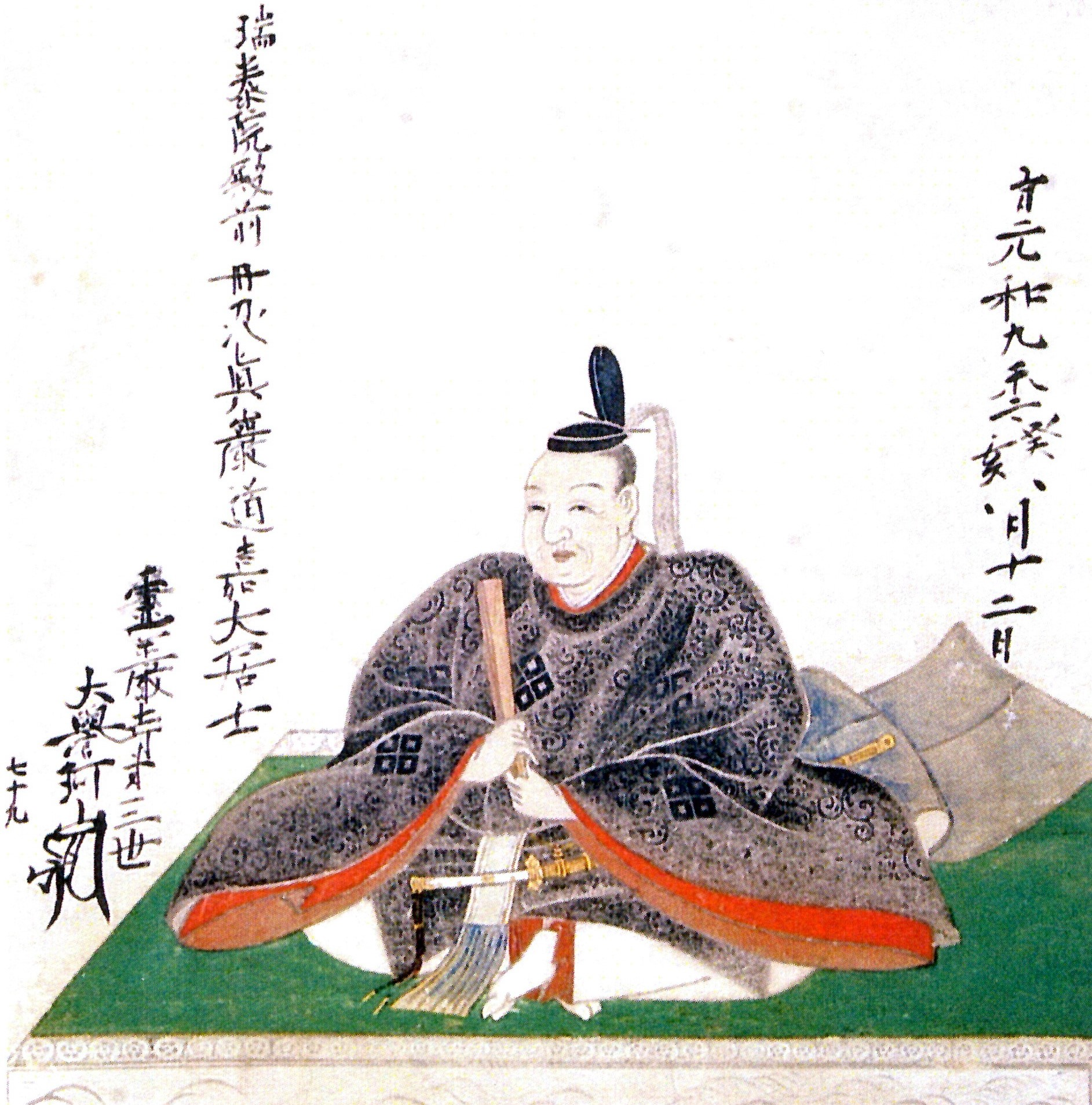 宮津藩主京極高知の肖像。